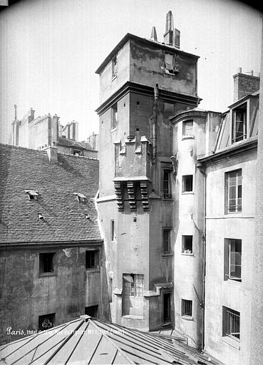 Tour : Partie supérieure